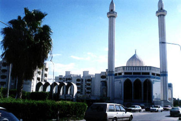 Misurata (Libia) - Moschea Licensing Categoria:Misurata